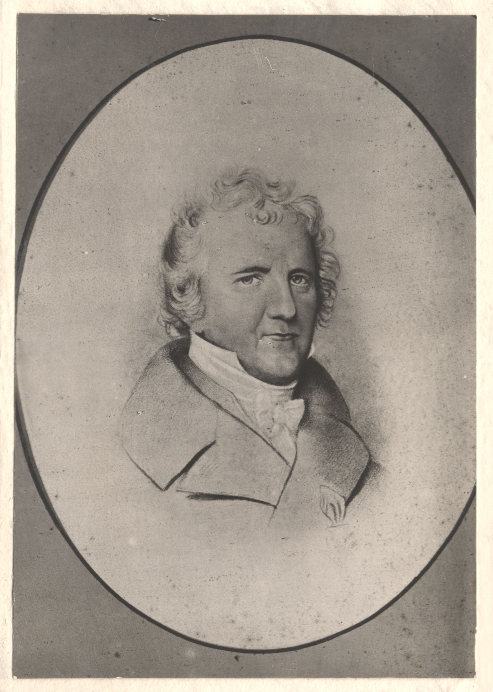 Christoph Adam von Stackelberg